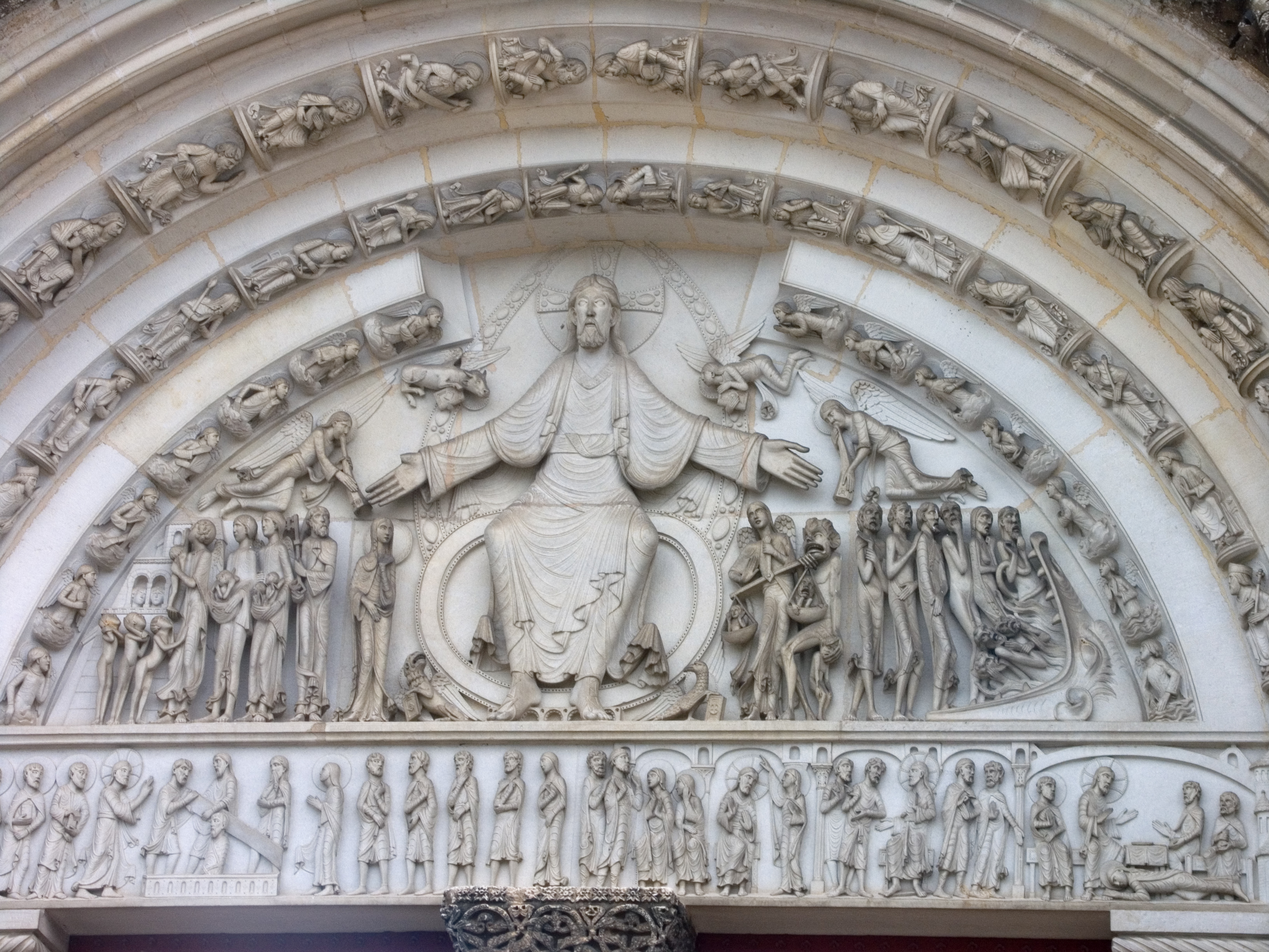 Tympan (externe) de l'abbatiale de Vézelay